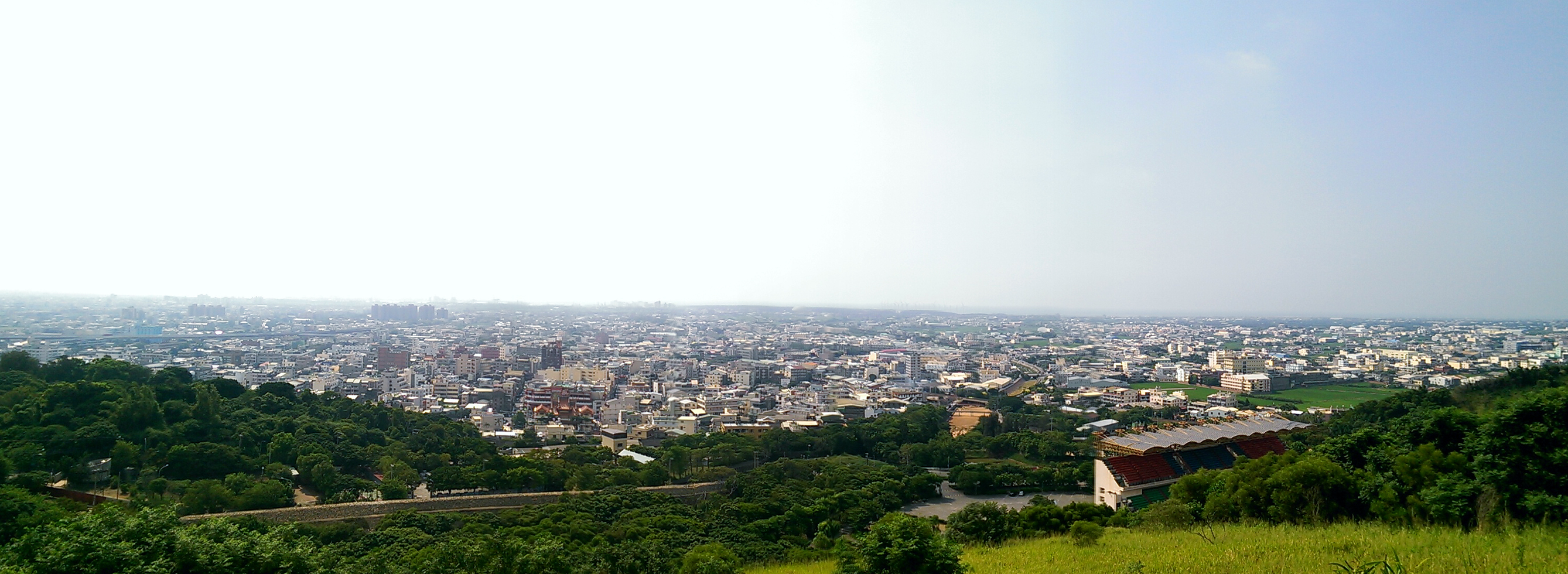 中文（台灣）: 清水平原一景，清水區市景